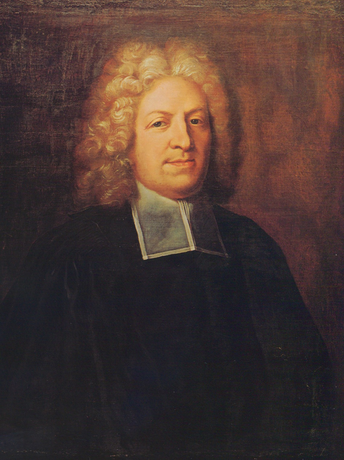 Bénédict Pictet (1655-1724), vers 1720.